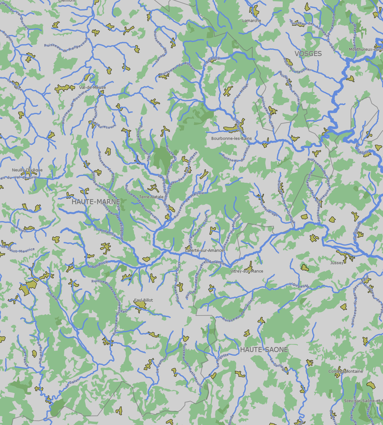 Hydrographie du territoire Apance-Amance. Source des données : Corine Land Cover (occupation des terres) et Sandre (hydrographie)